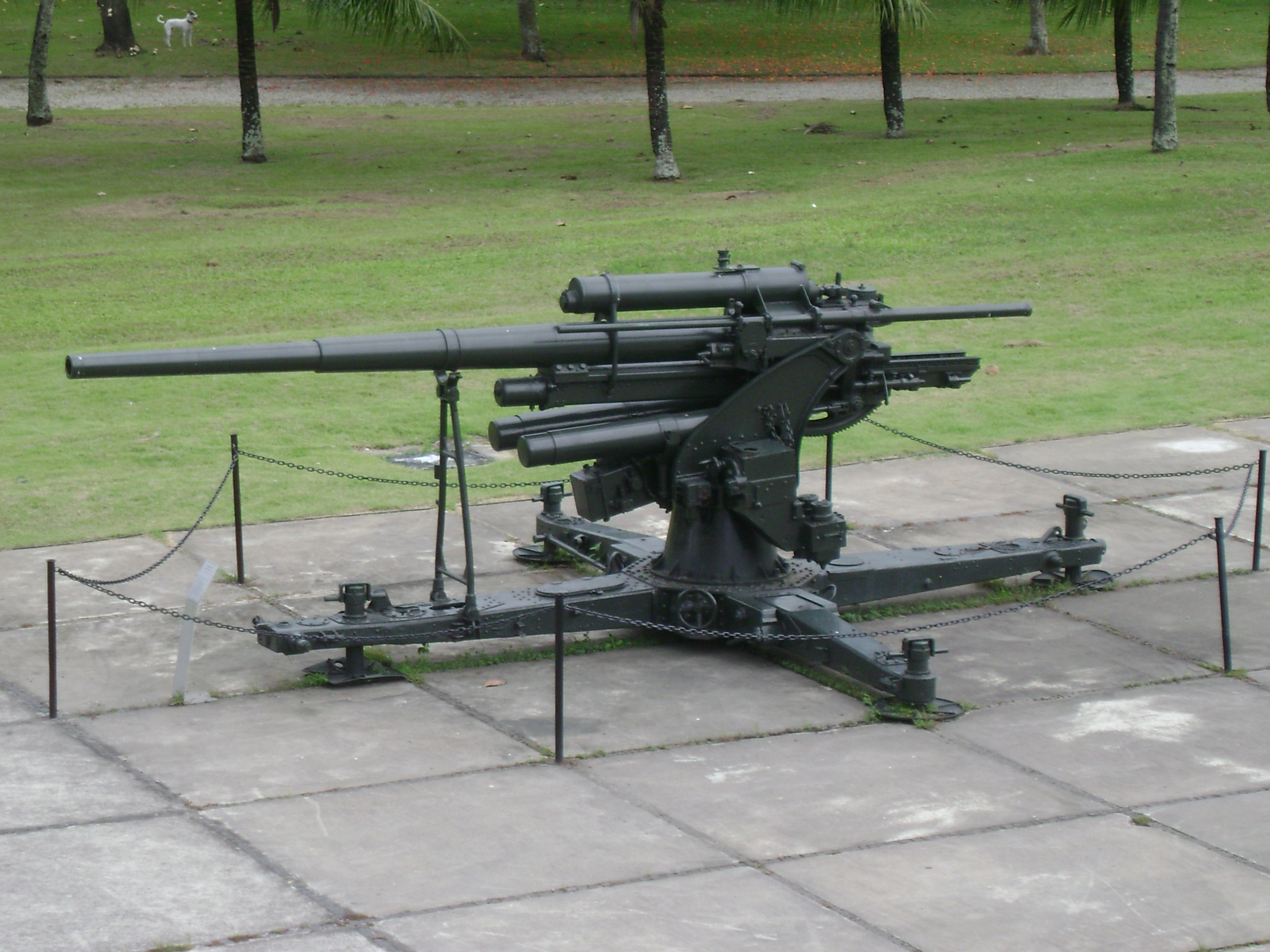 Canhão anti-aéreo alemão 'Flak 36' em base fixa na entrada do Memorial aos Pracinhas da 2a Guerra Mundial no Rio de Janeiro.